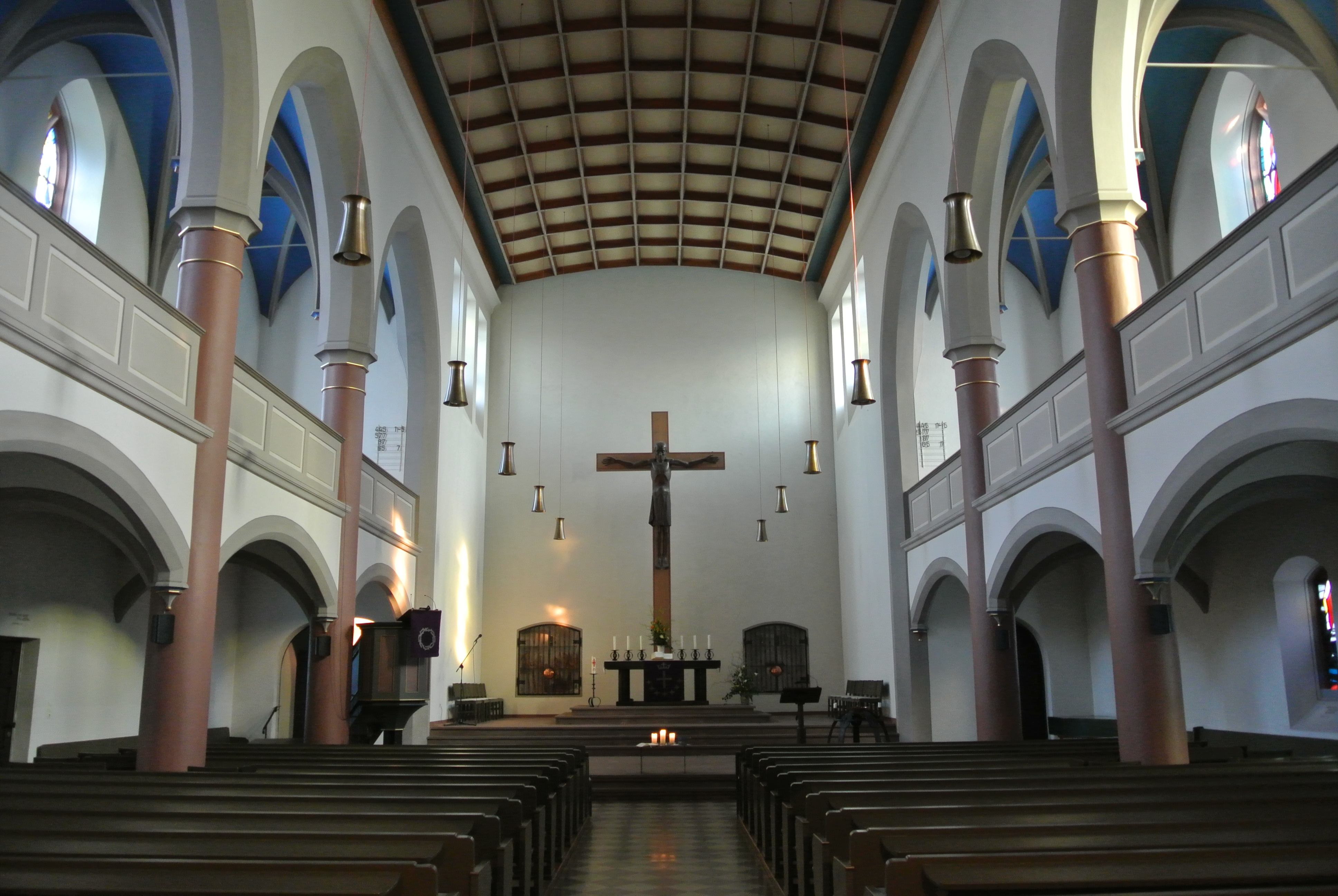 Evangelische St. Thomaskirche in Frankfurt-Heddernheim, Heddernheimer Kirchstraße 2; Baujahr 1898; Architekt Joseph Dormann; Neugotik; Baudenkmal; Innenraum Altarwand